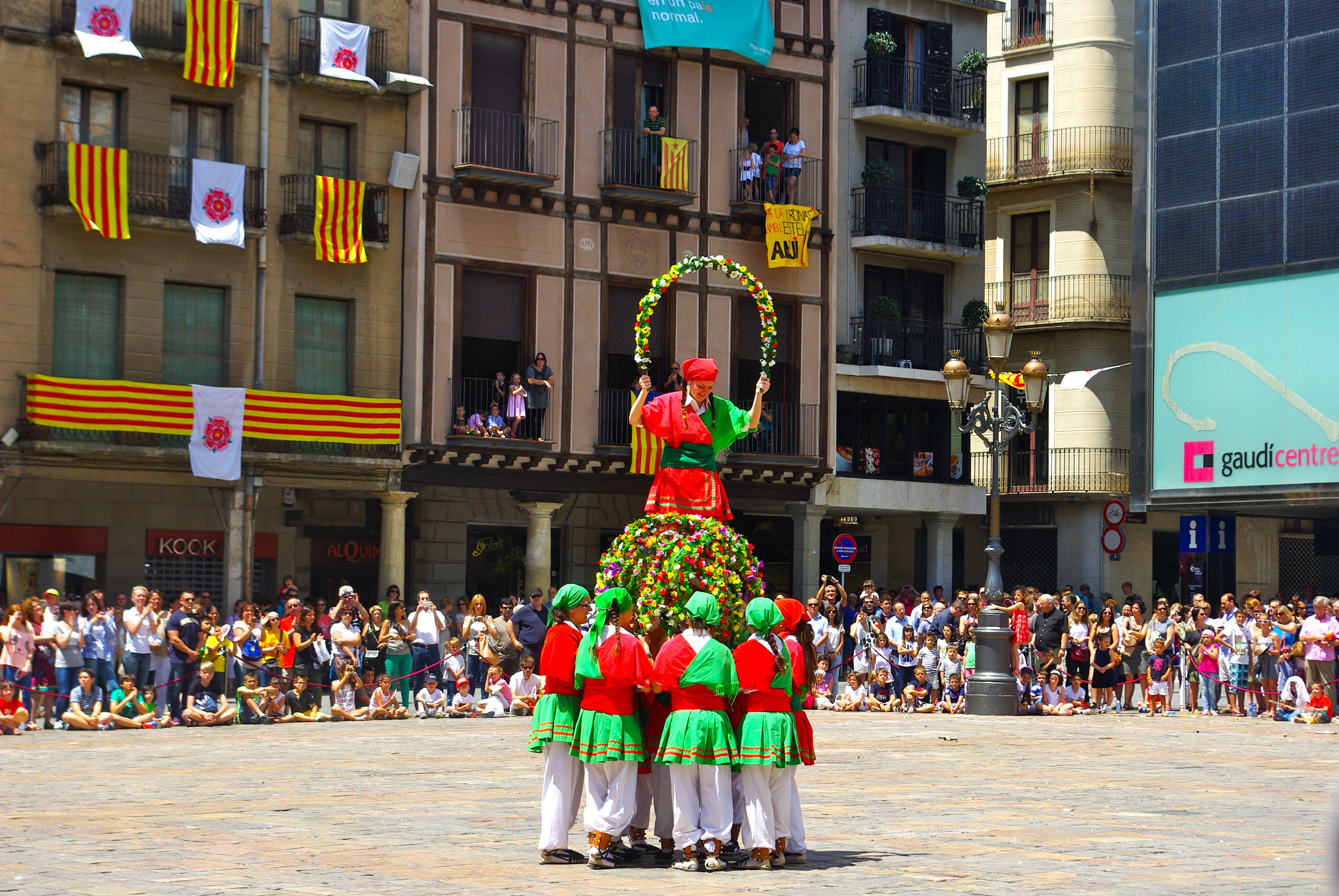 Ball de Cercolets. Sant Pere 2014